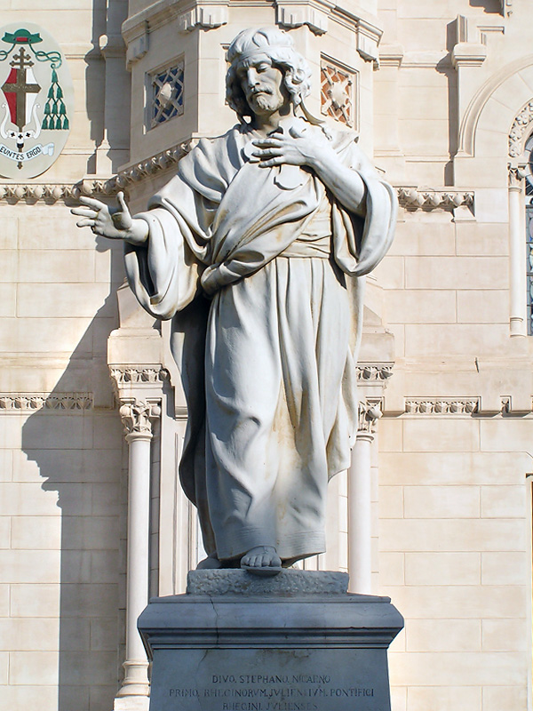 Francesco Jerace, Santo Stefano di Nicea, statue at Reggio Calabria cathedral